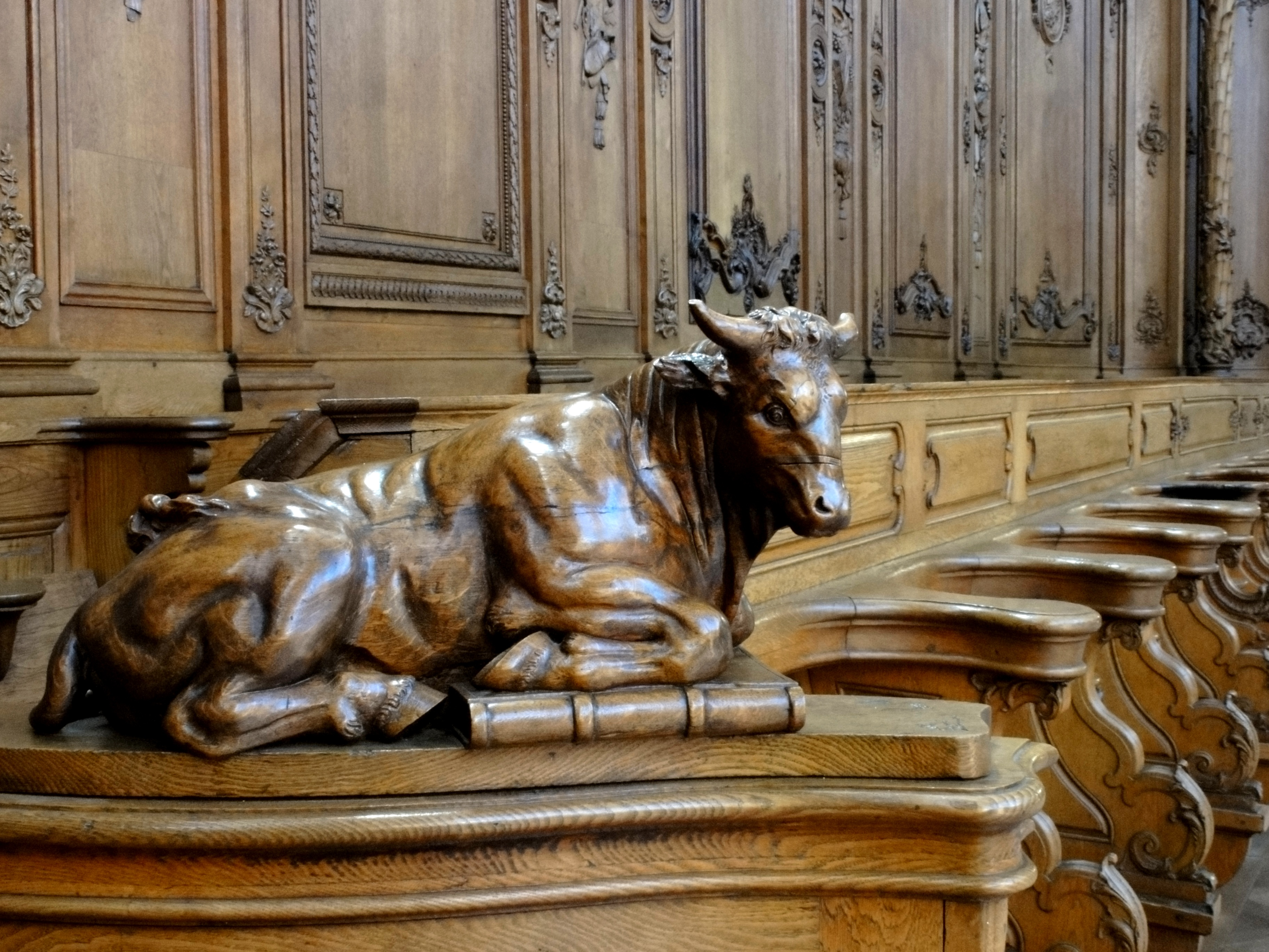 Alsace, Bas-Rhin, Abbatiale Saint-Étienne de Marmoutier (PA00084783, IA67007715). Stalles et lambris du chœur (XVIIIe): Taureau de St-Luc. This object is classé Monument Historique in the base Palissy, database of the French furniture patrimony of the French ministry of culture, under the references PM67000168 and IM67011775.